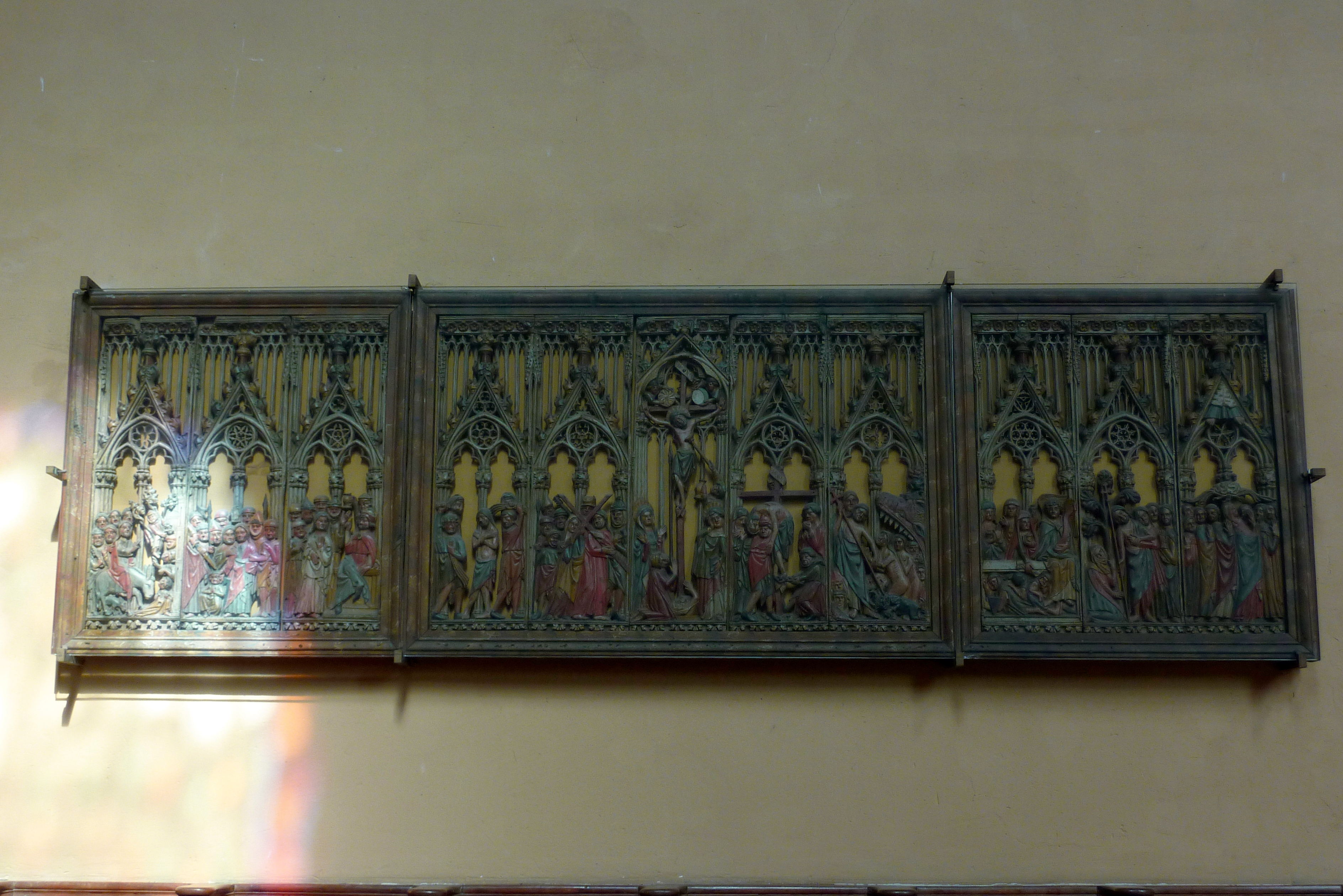 Katholische Pfarrkirche Saint-Clair-Saint-Léger in Souppes-sur-Loing im Département Seine-et-Marne in der Region Île-de-France (Frankreich), Altarretabel aus dem 16. Jahrhundert, nach mittelalterlichem Vorbild, Darstellung: Leidensgeschichte Jesu